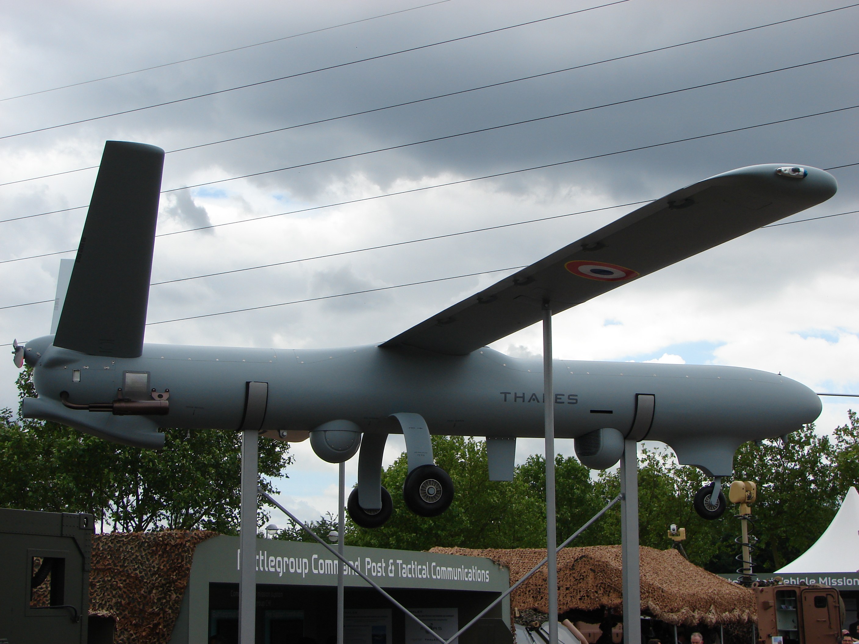 Drone de Thales Avionics à Eurosatory 2012